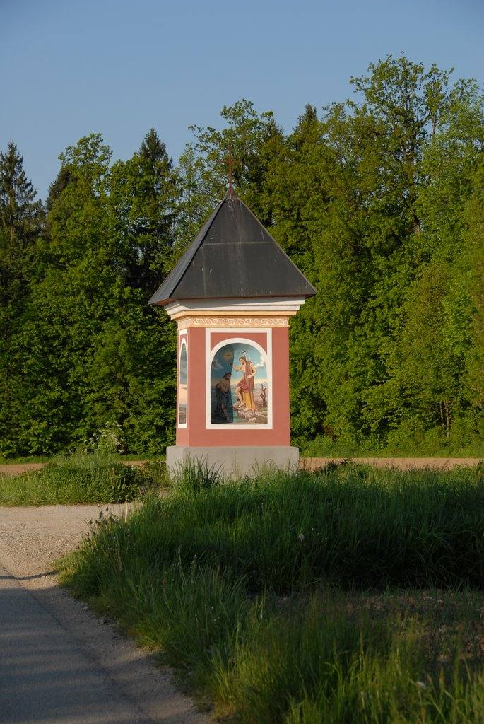 Srednja vas pri Šenčurju wayside shrine